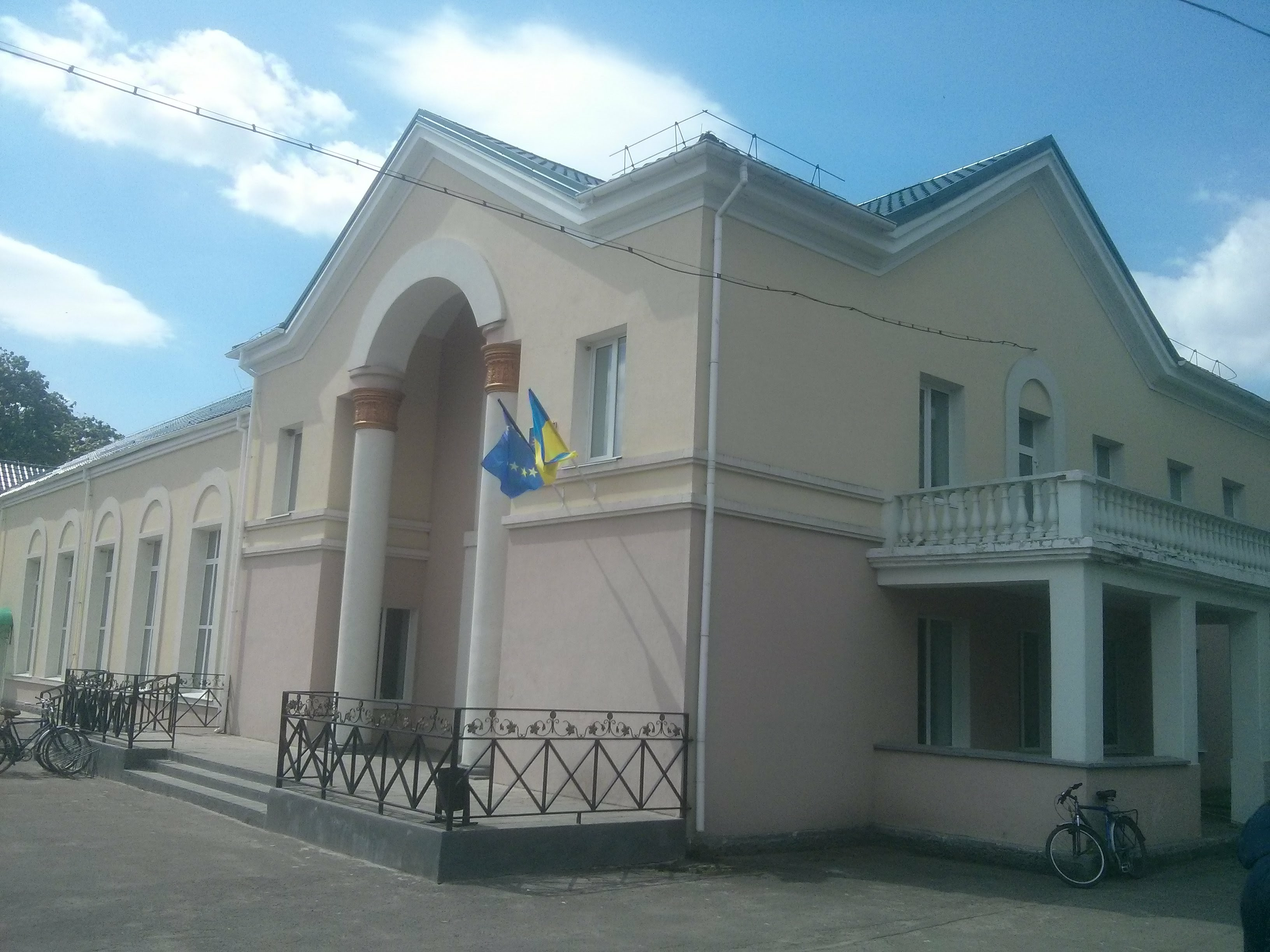 2017 рік